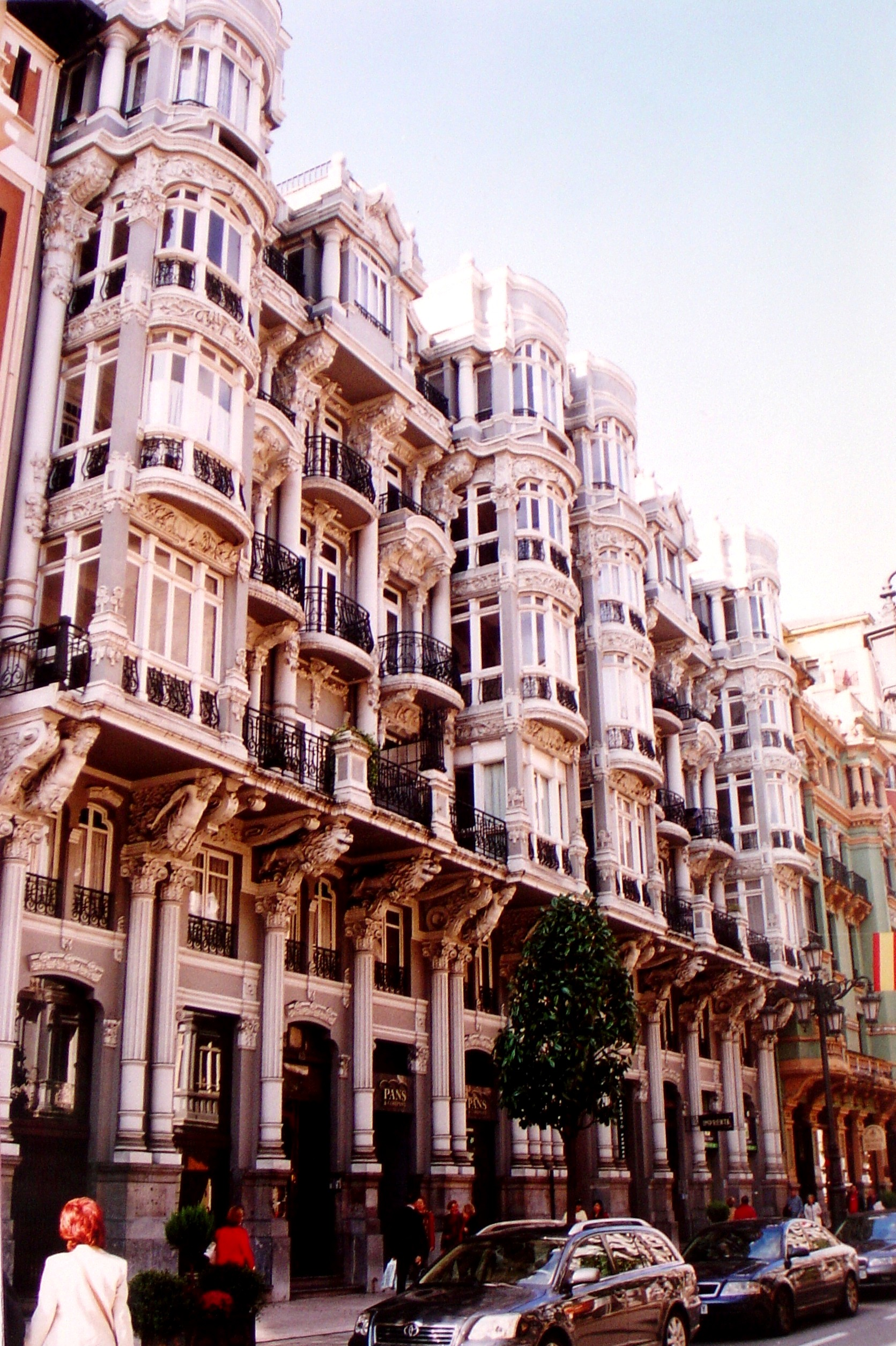 Edificio de las Casas del Cuitu, calle de Uría, Oviedo, obra de Ulpiano Muñoz Zapata.